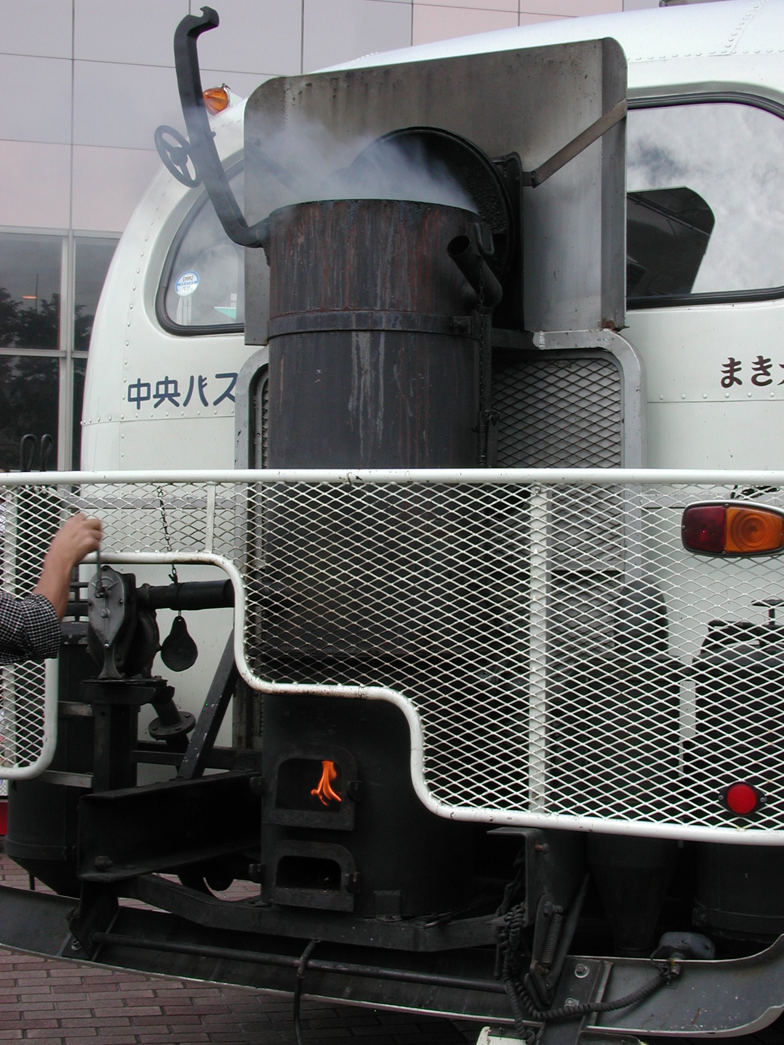 北海道中央バス：まき太郎：木炭ガス発生装置イトーヨーカドー八戸沼館店（ピアドゥ内）にて（南部バスなどが主催するイベント内より）